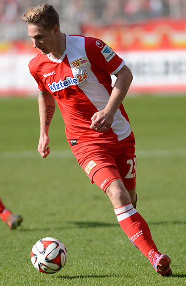 Sebastian Polter läuft mit Ball